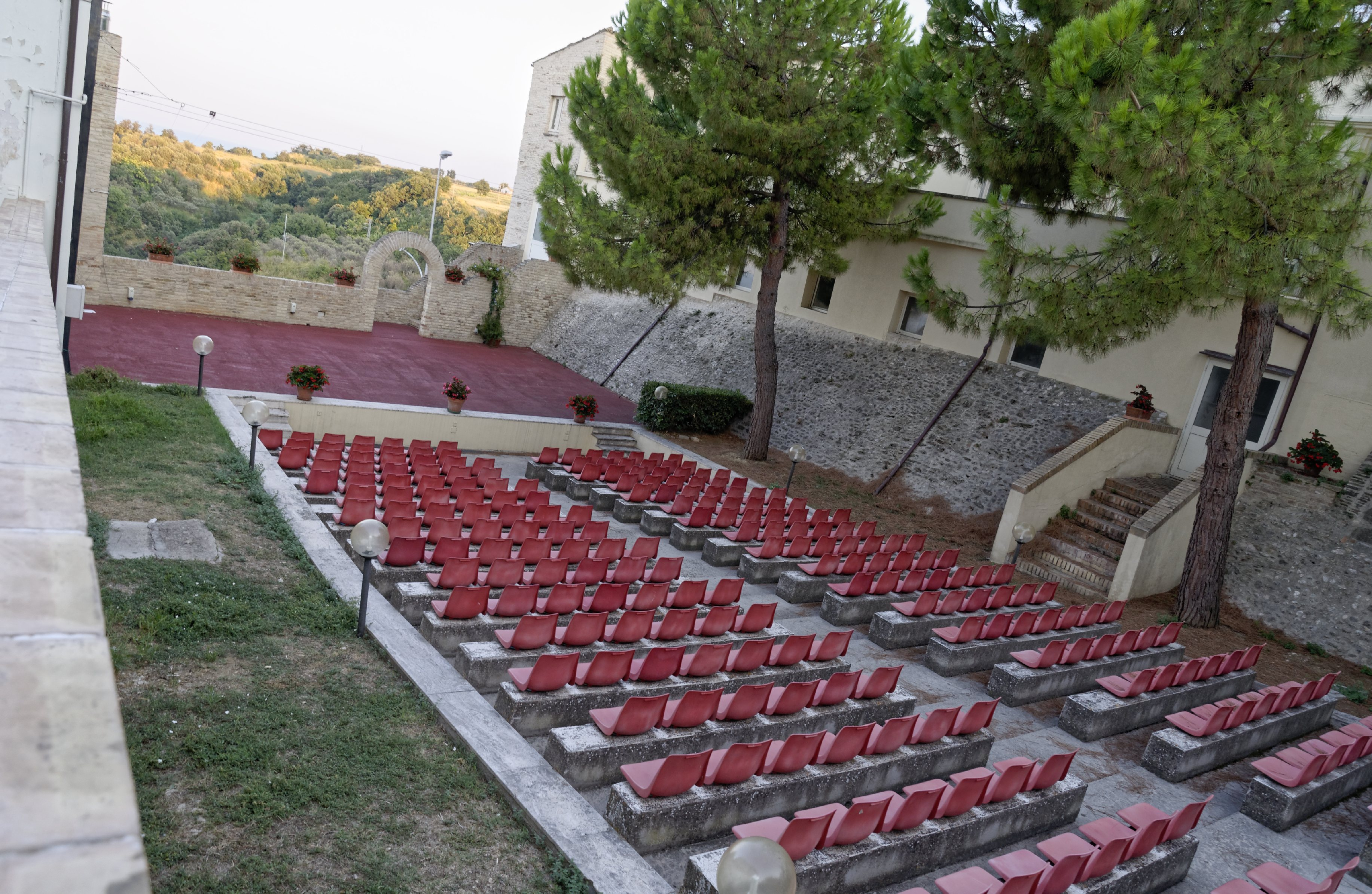 San Vito Chietino 2015 Dieses Foto entstand in Zusammenarbeit mit Stadtbesichtigungen.de Die Seiten Stadtbesichtigungen.de, der dazugehörige Reise Blog sowie die Facebookseite: Stadtbesichtigungen Rom dürfen dieses Bild für Ihre Veröffentlichungen ohne den Hinweis auf Wikipedia, Commons bzw der Lizenz verwenden. Die Verantwortlichen habe von mir (Ra Boe) die Originaldaten zur freien Verfügung übermittelt bekommen.